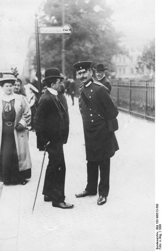 Berlin, Erteilung von Auskünften Berlin 1909 Die Berliner Omnibus-Gesellschaft hat an großen Verkehrspunkten der Stadt Beamte postiert, die dem Publikum Auskunft erteilen. (Photographische Momentaufnahme)